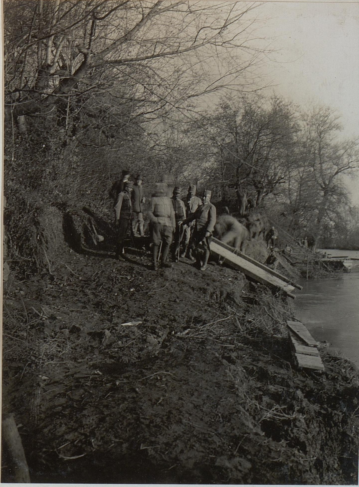 FZM. von SCHEUCHENSTUEL an der Ueberschiffungsstelle. Cukojevac an der Morava. November 1915.